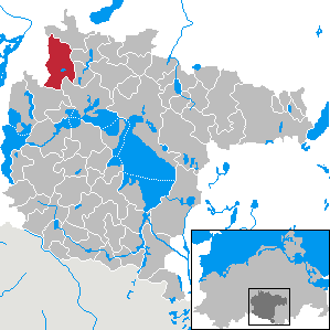 Hohen Wangelin in Mecklenburg-Western Pomerania - District Müritz